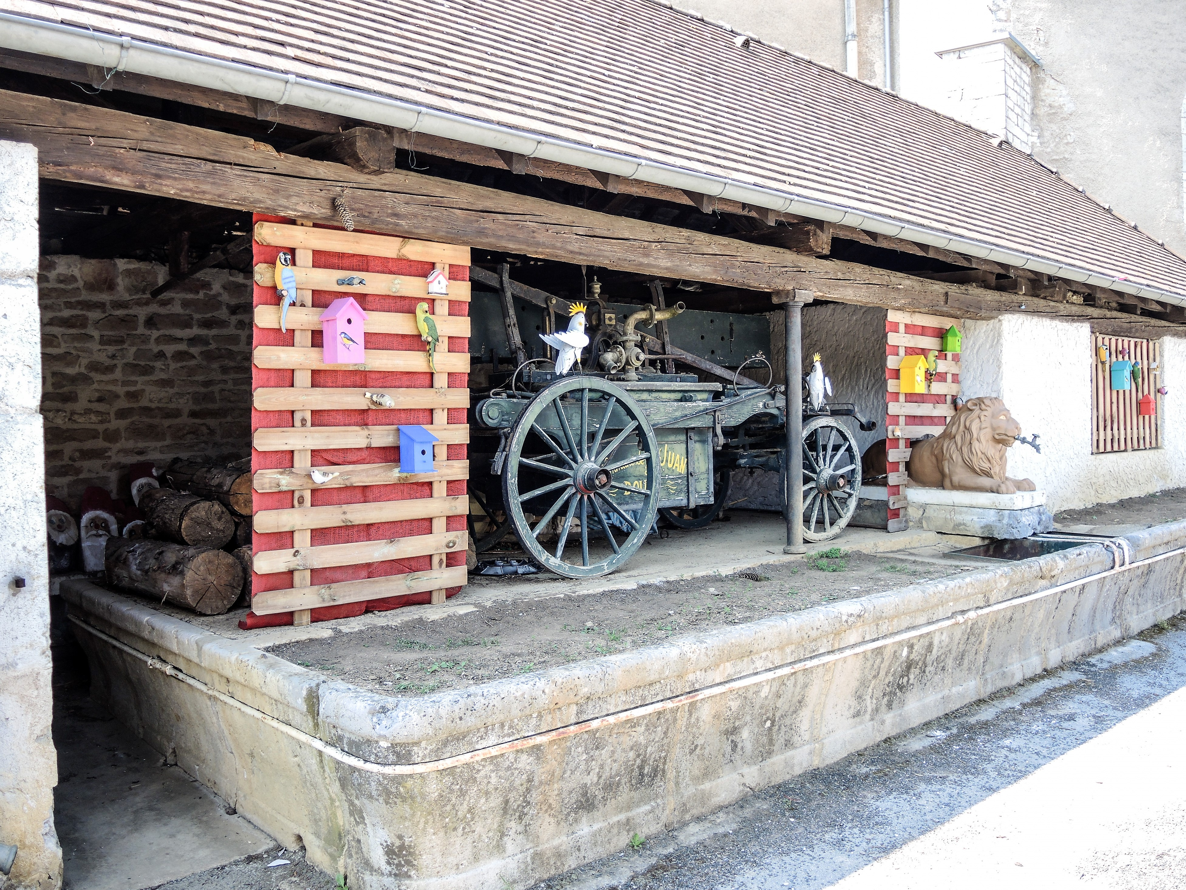 Ancienne fontaine-lavoir du lion. Derrière, l'ancienne pompe à incendie de la commune de Saint-Juan. Doubs